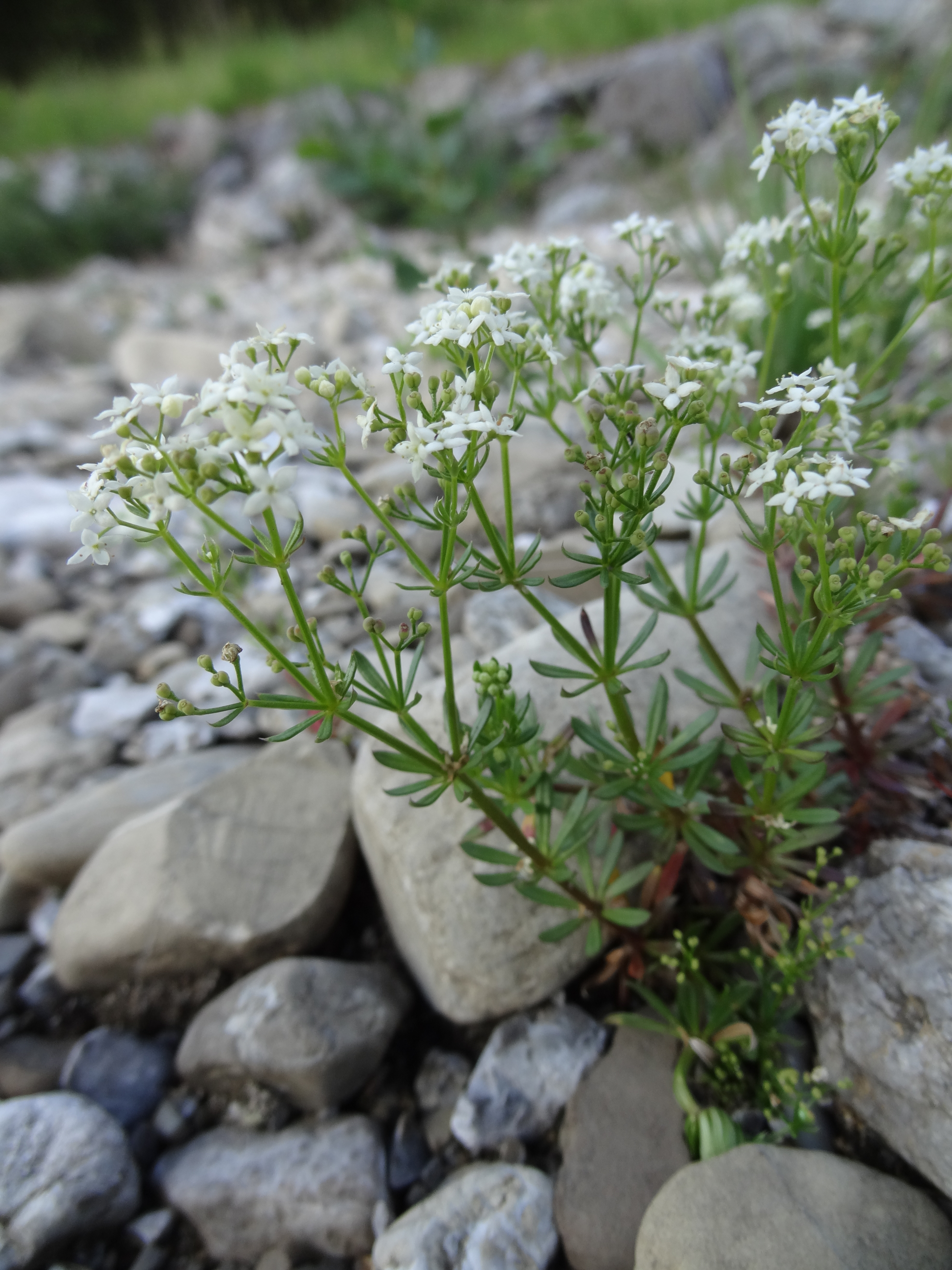 Rubiaceae Deutschland, Bayern, Allgäu, Oberstdorf, Stillachtal, 900 m Photo: U.Schmidt, 23.VI.2012